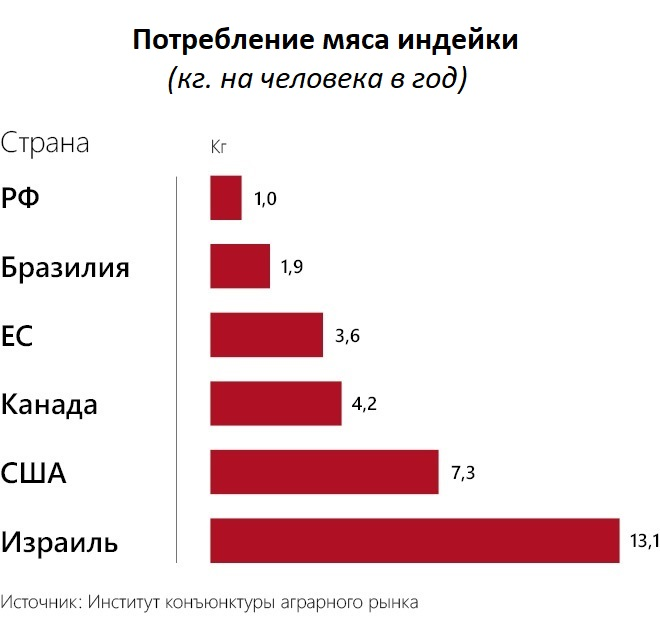 Потребление индейки на душу населения в год